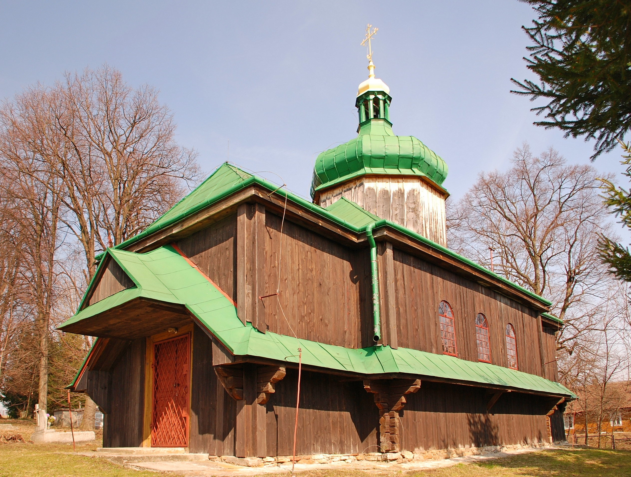 wieś Młodowice